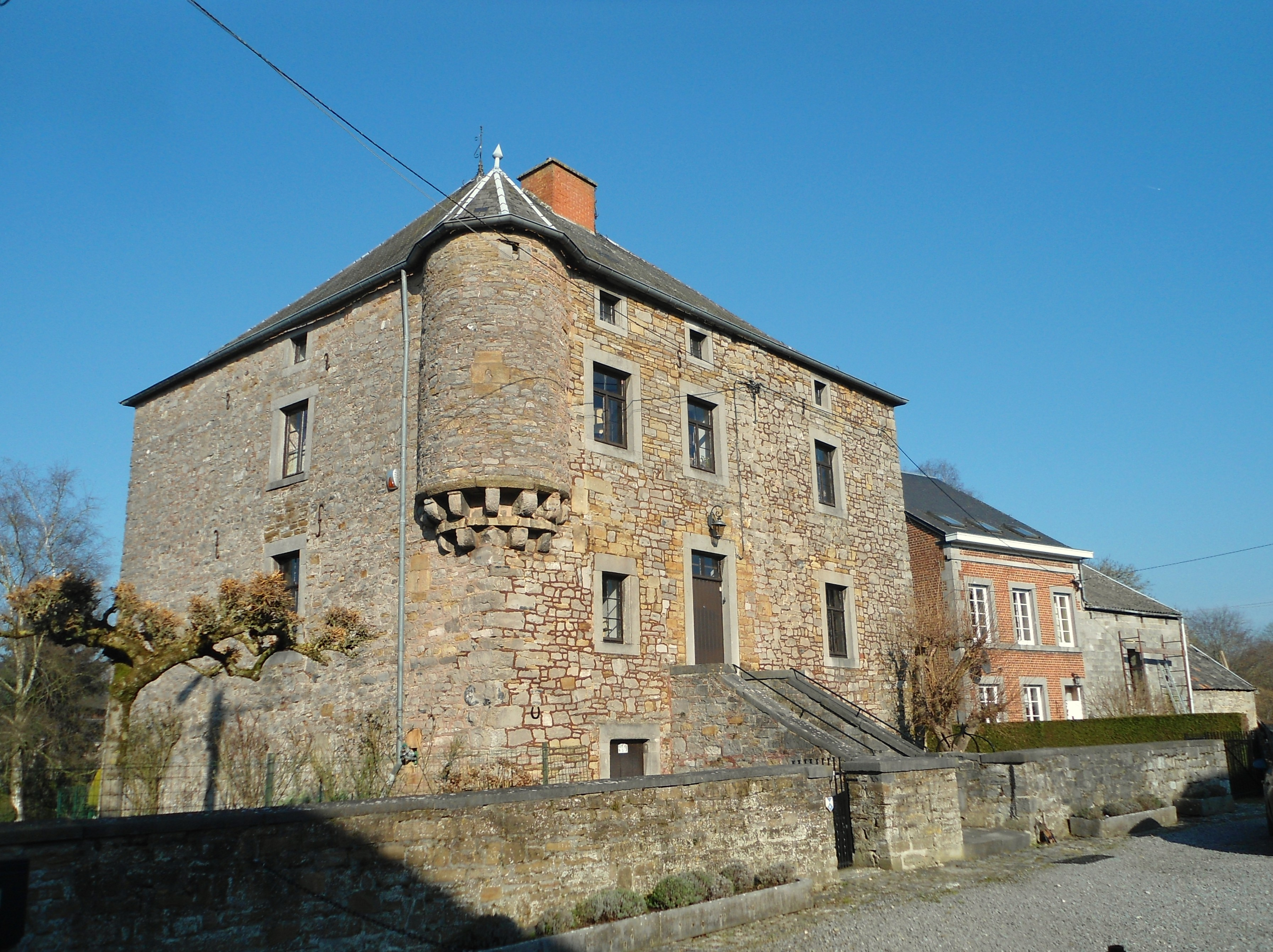 Maison forte de Damré Sprimont